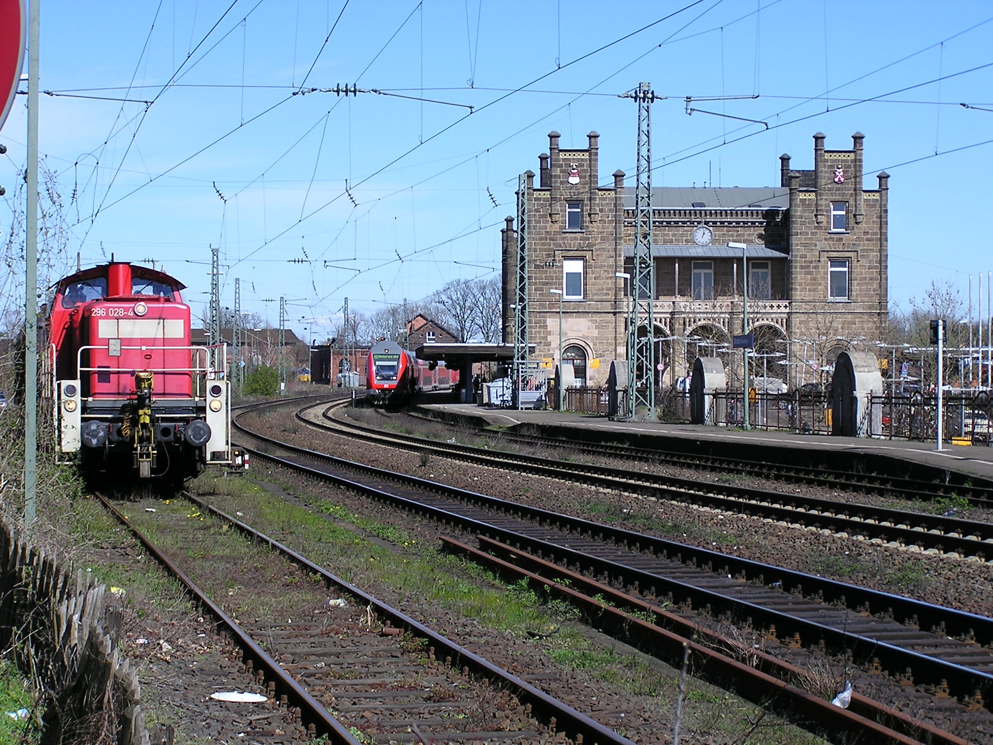 Lok der Baureihe 296 028-4 im Bahnhof Minden (Westf.) in Minden, Nordrhein-Westfalen. Am Bahnsteig ein Regionalexpress (vermutlich Weser-Leine-Express RE 70 aus Braunschweig) Typ Doppelstockwagen mit Endbahnhof Bielefeld Hauptbahnhof. Der Bahnhof selbst war einst Teil der Festung Minden.